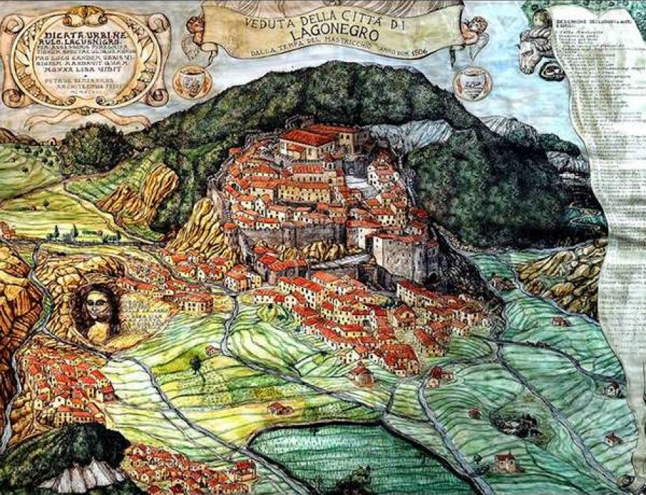 Dipinto del Maestro Semeraro